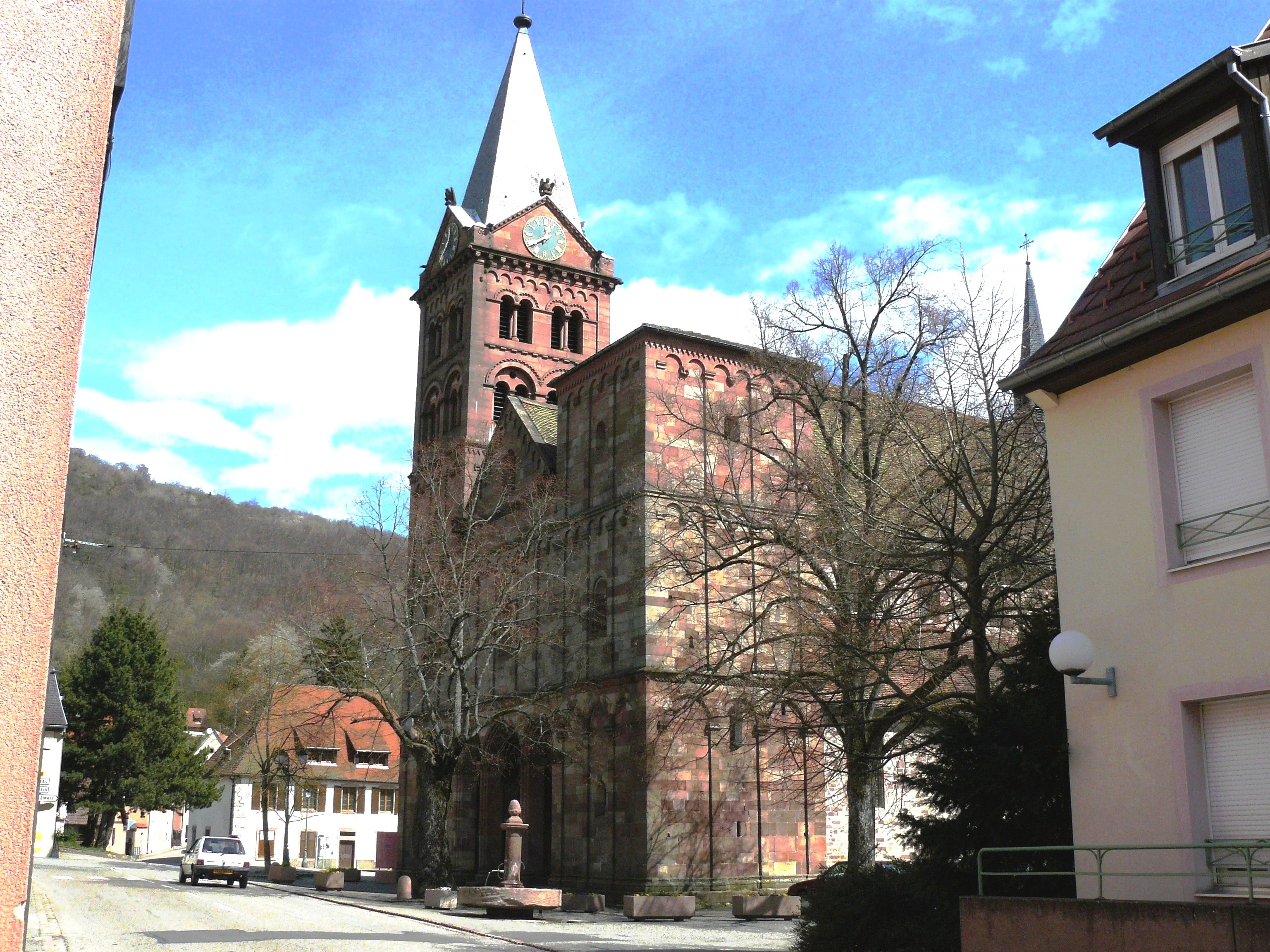 Lautenbach 102.JPG